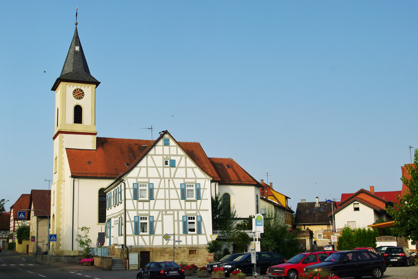 Siegelsbach, kath. Kirche